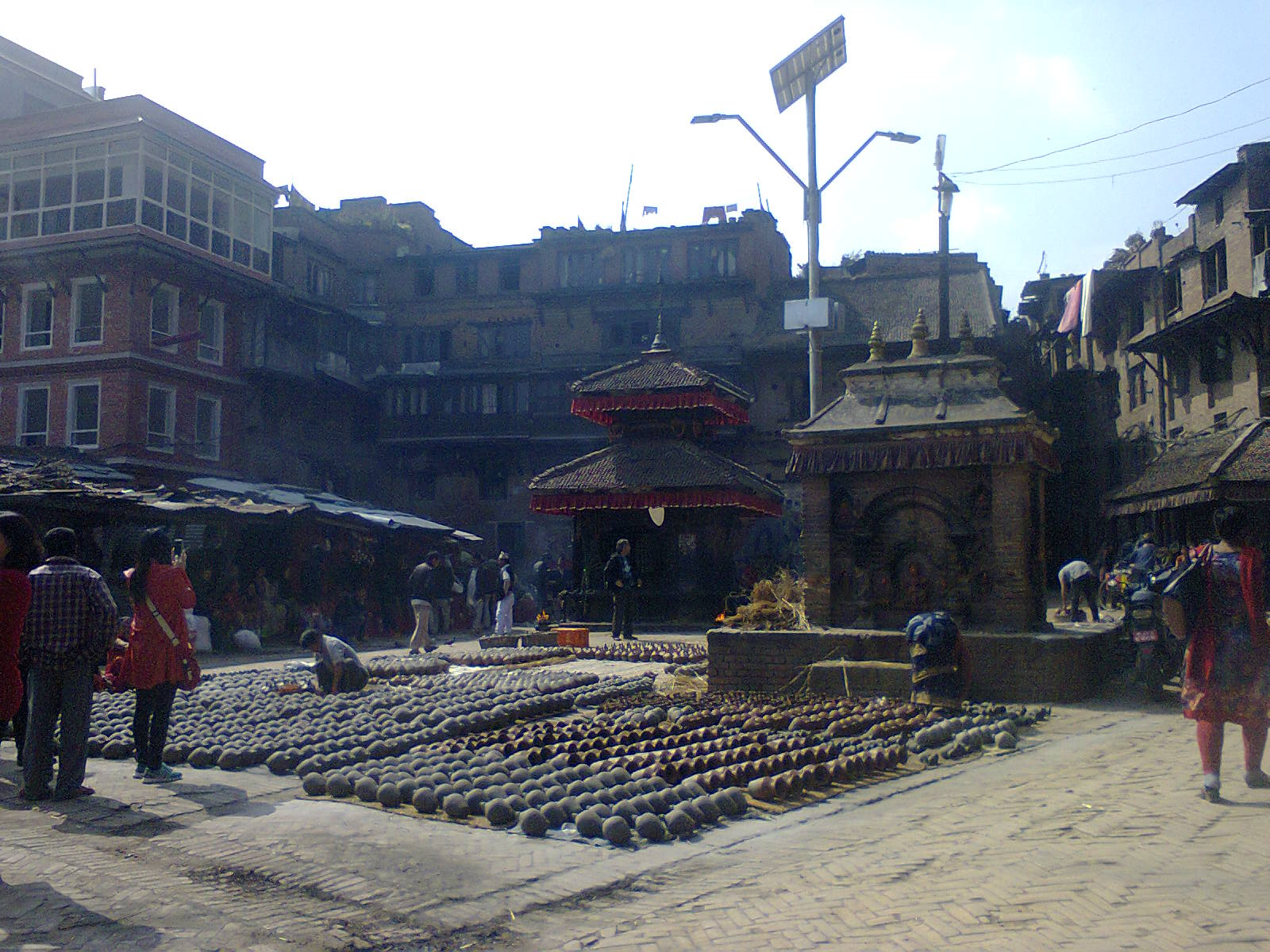 नेपाली: तालाको भक्तपुर (Pottery Square)